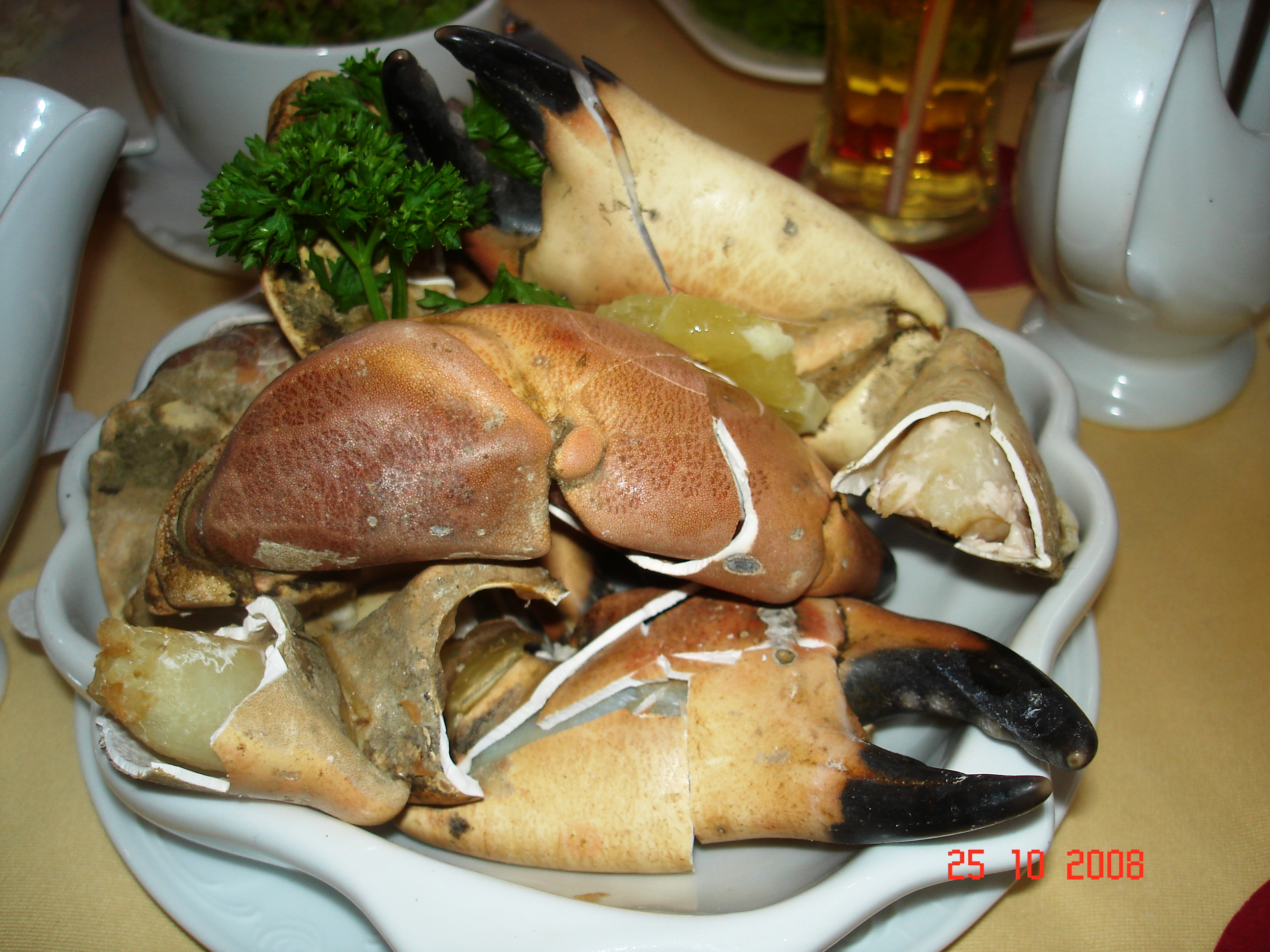 Servierschale mit frischen Kniepern